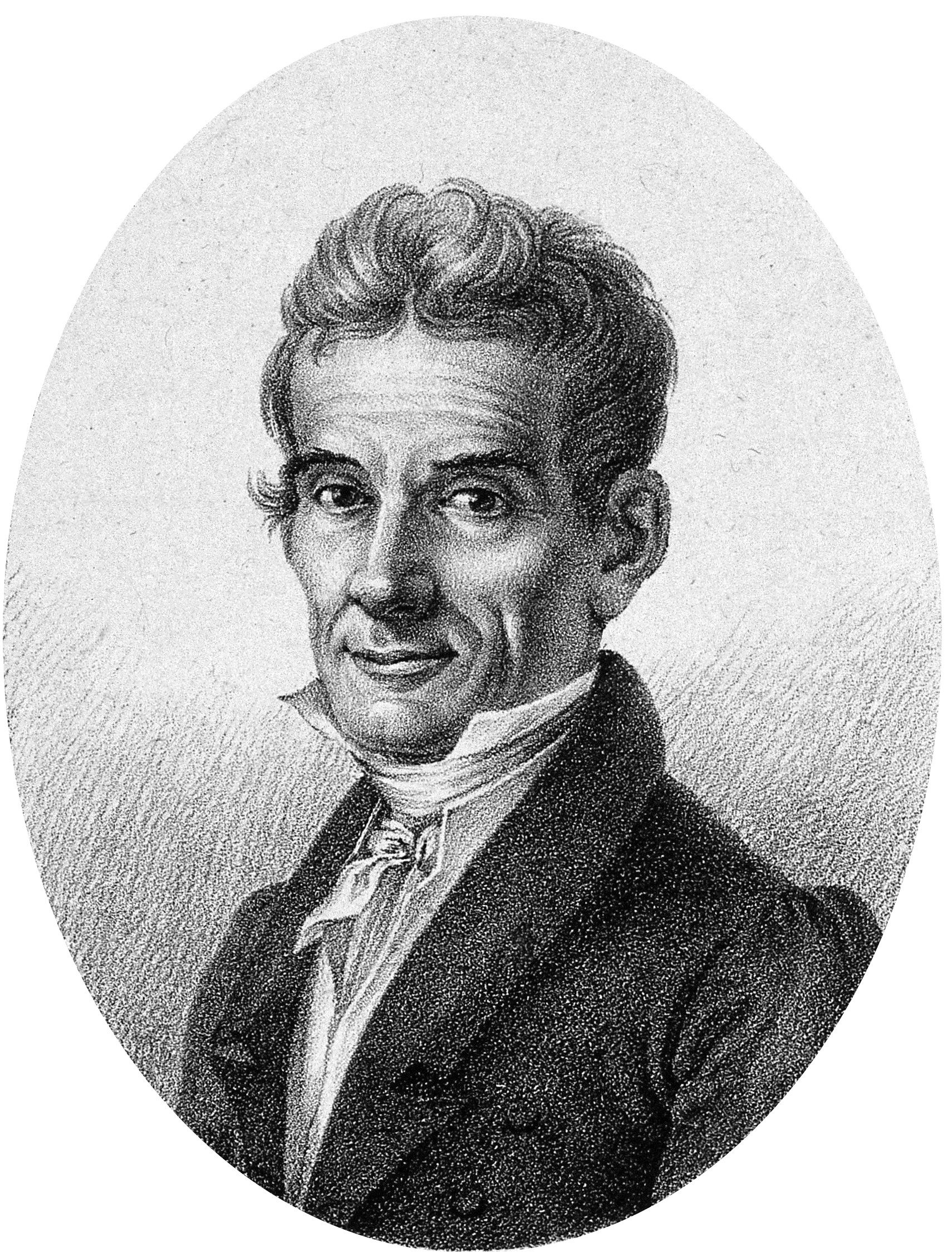 Genre/Technique: Portrait prints. Lithographs. Subject name: Raddi, Giuseppe, 1770-1829.